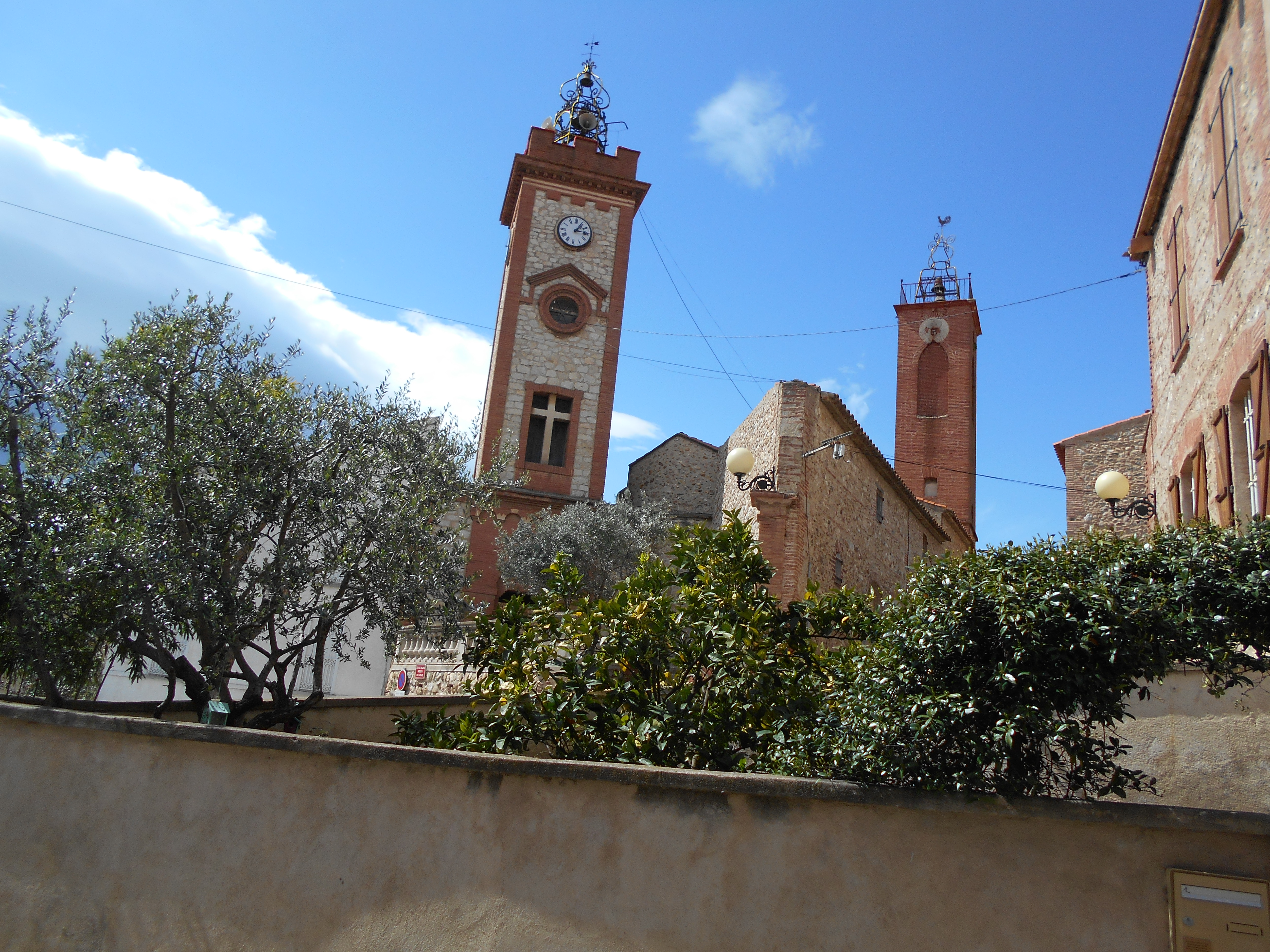 Sant Esteve de Pontellà. Els campanars 1